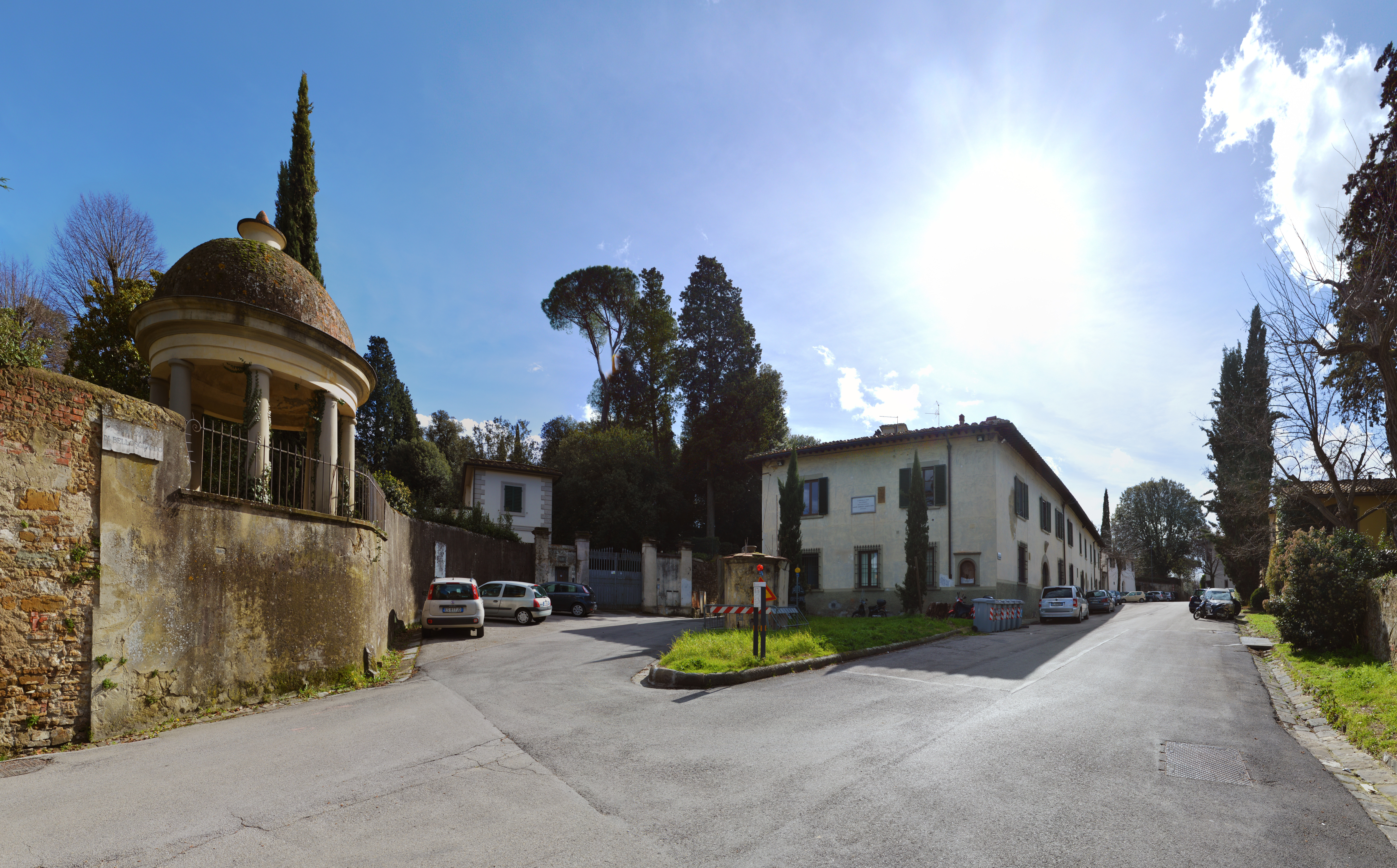 Piazza di Bellosguardo, veduta verso via Piana e via di San Carlo.